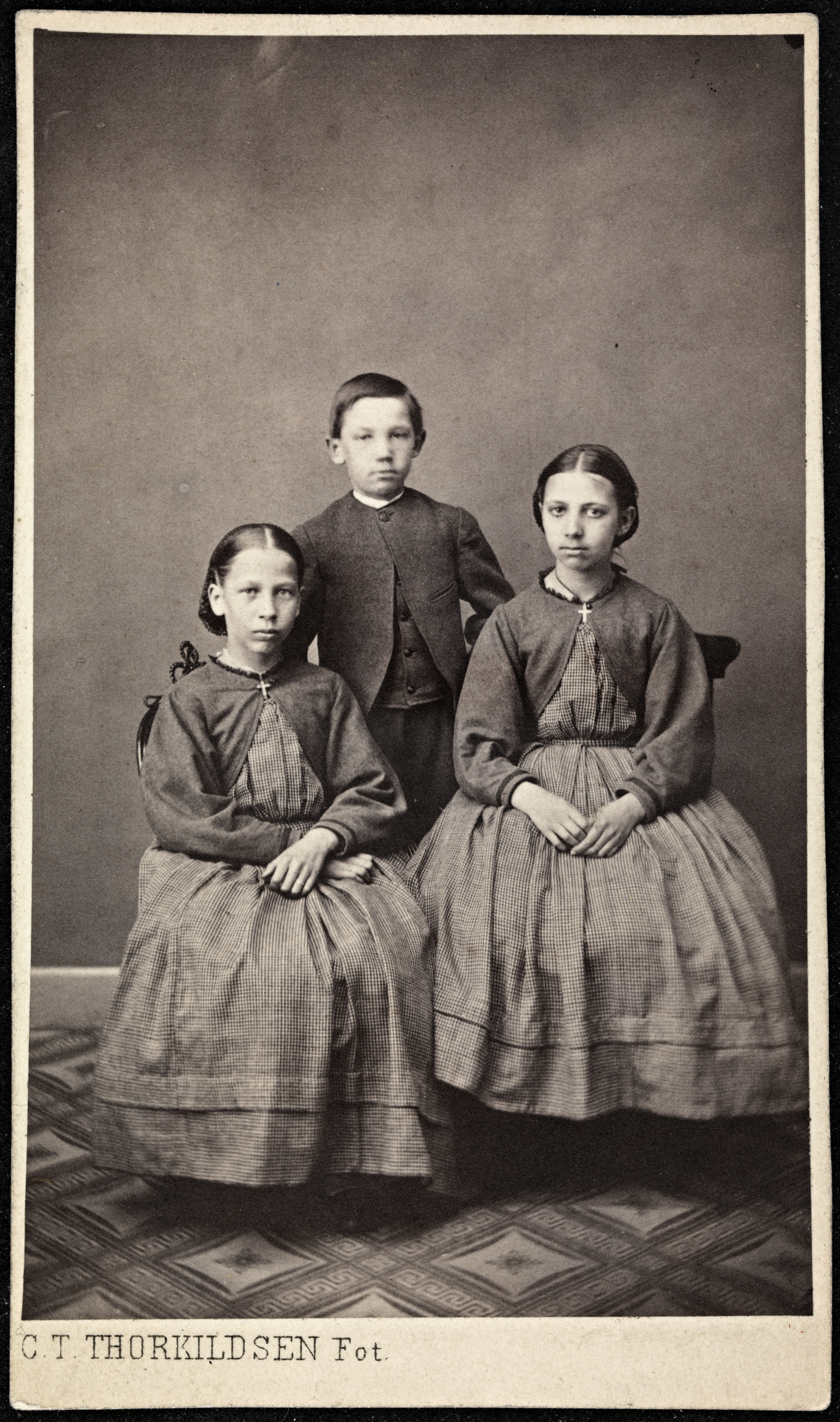 Beskrivelse / Description: Visittkort / Carte de visite. Barna til Jørgen Moe (1813-1882). Dato / Date: ukjent / unknown Sted / Place: Drammen Fotograf / Photographer: C. T. Thorkildsen (Drammen) Digital kopi av original / Digital copy of original: s/h papirpositiv på visittkort. Eier / Owner Institution: Nasjonalbiblioteket / National Library of Norway Lenke / Link: Bildesignatur / Image Number: blds_06261